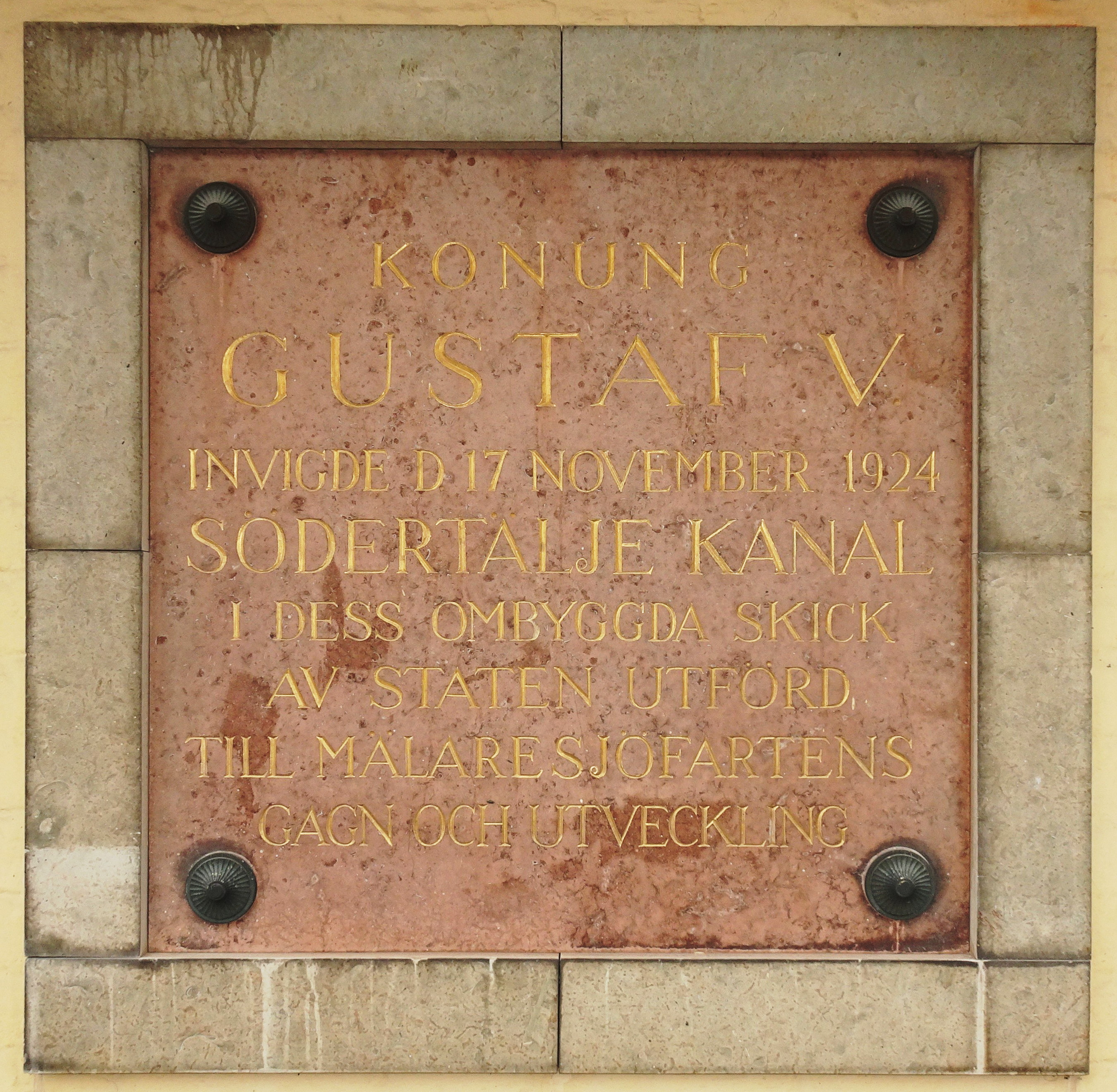 Södertälje sluss minnestavla på loshuset